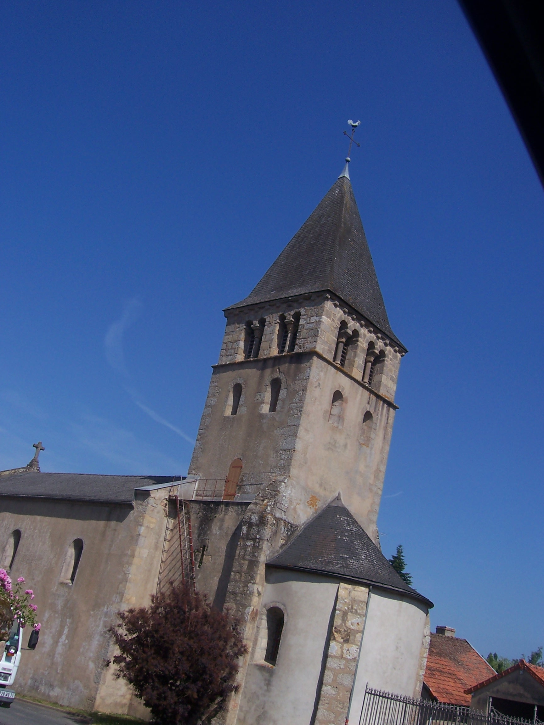 Eglise de Dettey